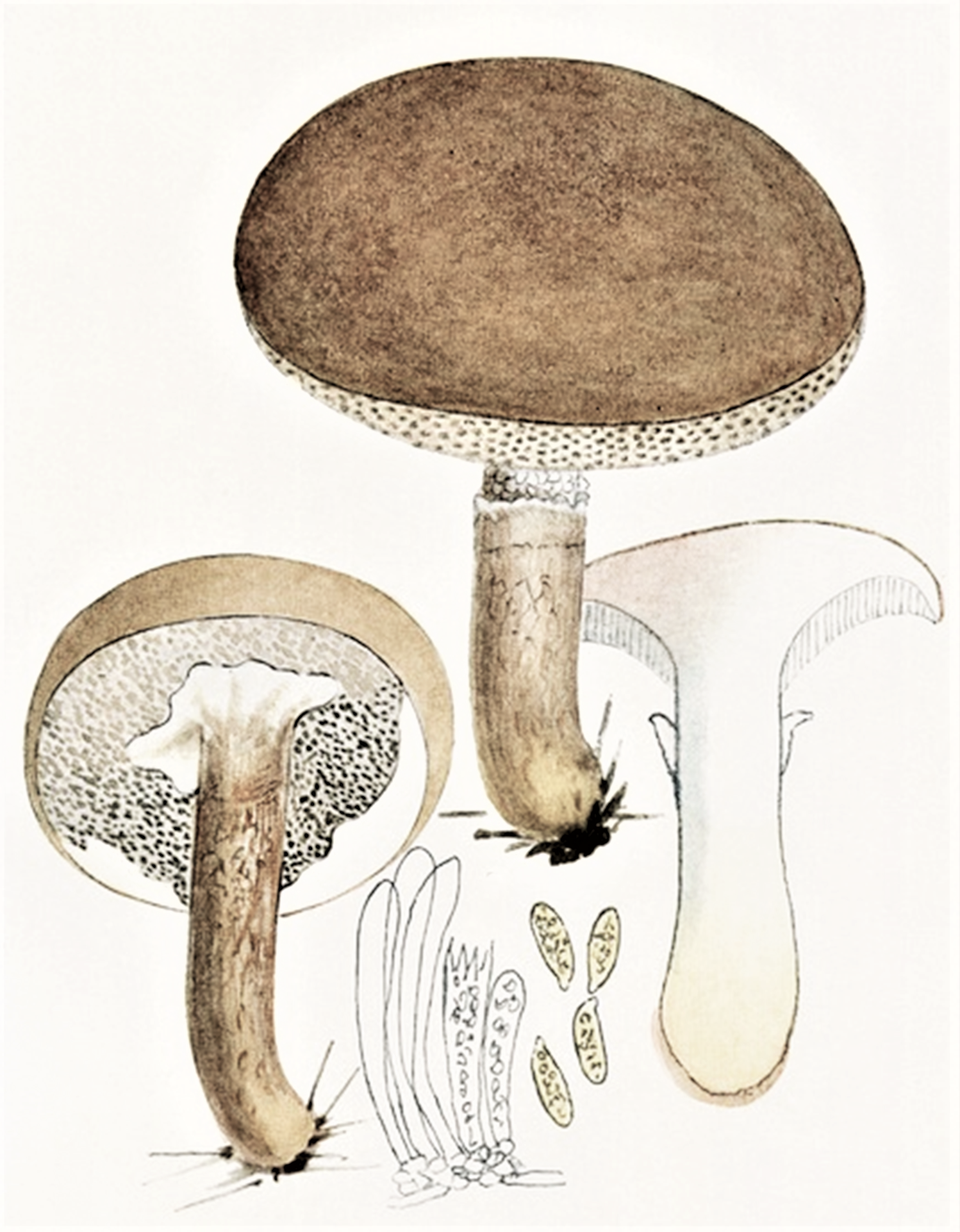 Giacomo Bresadola: Boletus viscidus (L., 1753), heute Suillus viscidus (L.) Roussel (1796)